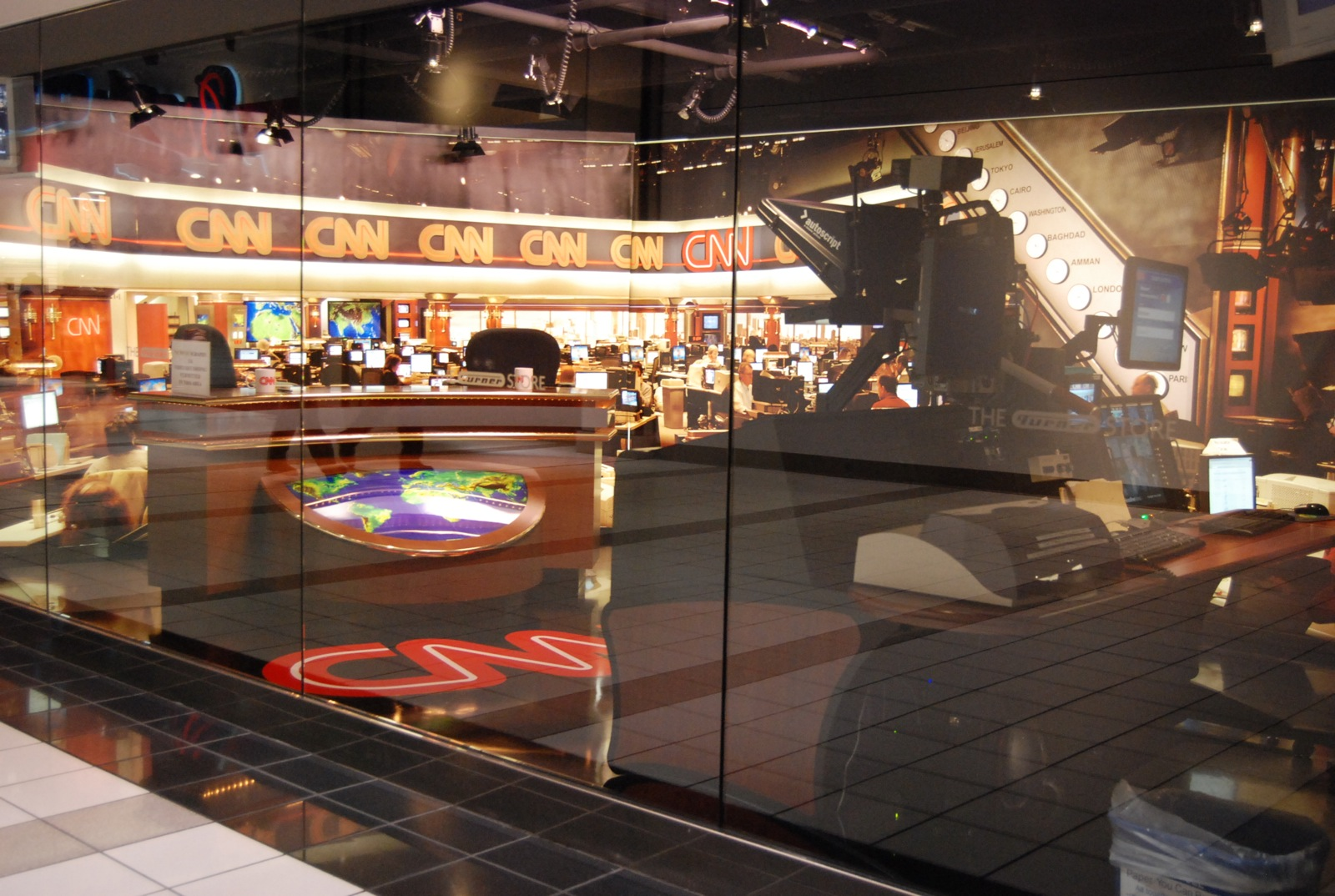 CNN studio